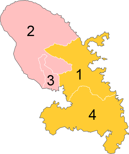 Résultats des élections législatives de Martinique en 2012